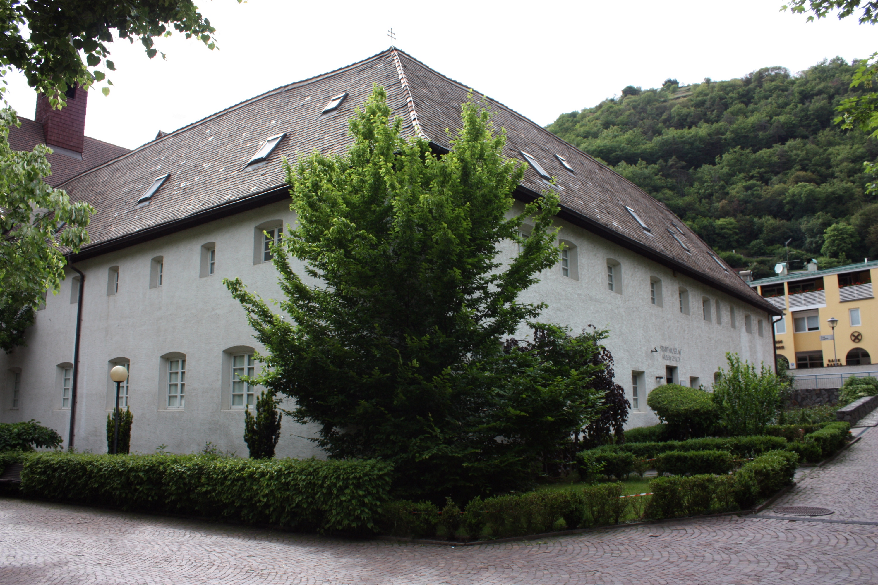 Klausen, Südtirol: Der Klausurbau des Kapuzinerkloster, heute Stadtmuseum